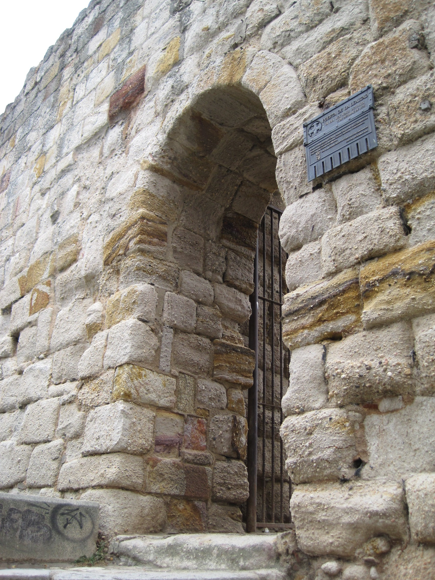 Portillo de la Lealtad, en Zamora (España).